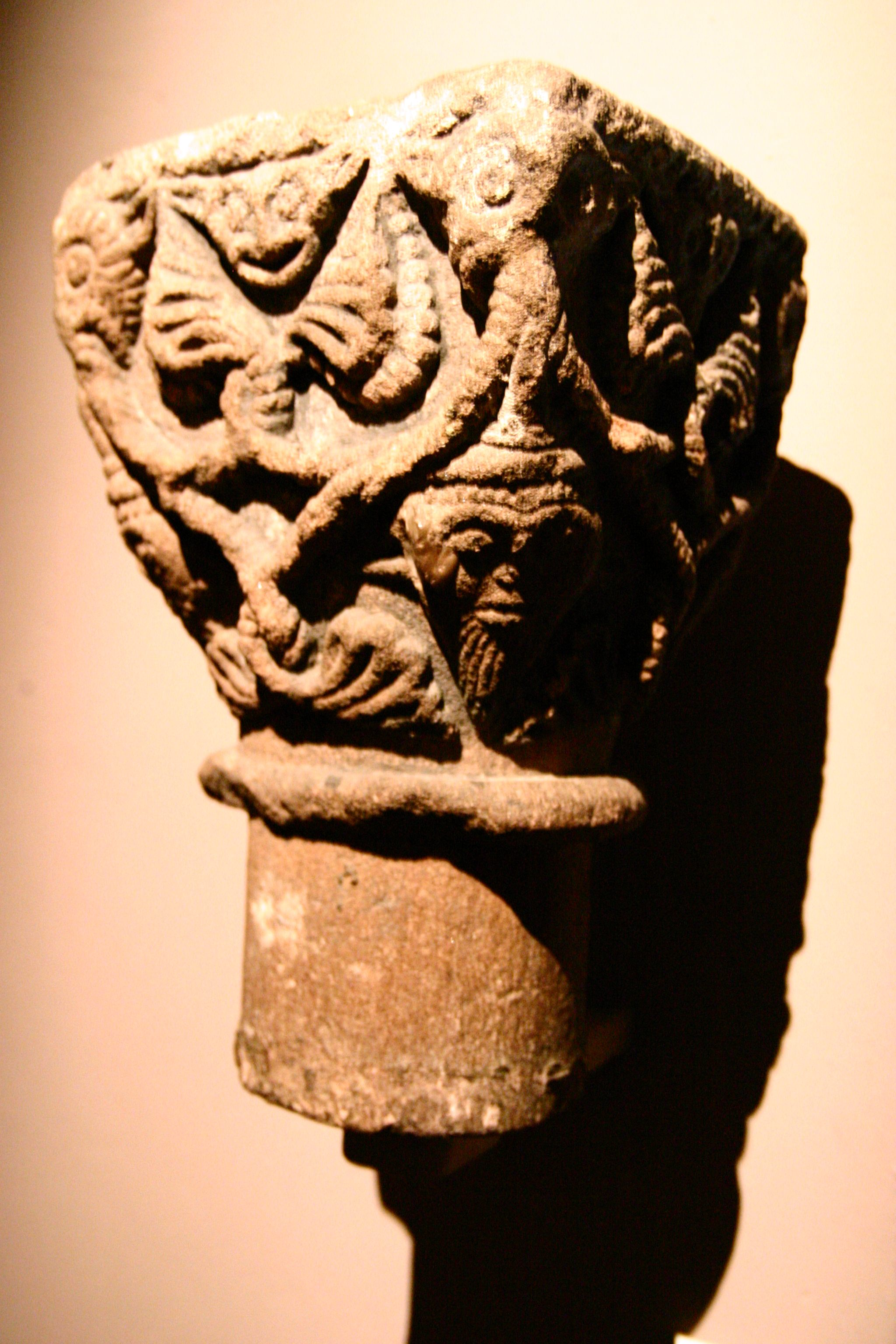 Chapiteau "Juif à la chauve-souris", art roman (Musée de l'Oeuvre Notre-Dame de Strasbourg) - Juifs coiffés du judenhat imposé au Concile de Latran au XIIIème s., mêlés aux animaux de nuit effrayants qui préfèrent les ténèbres à la lumière.